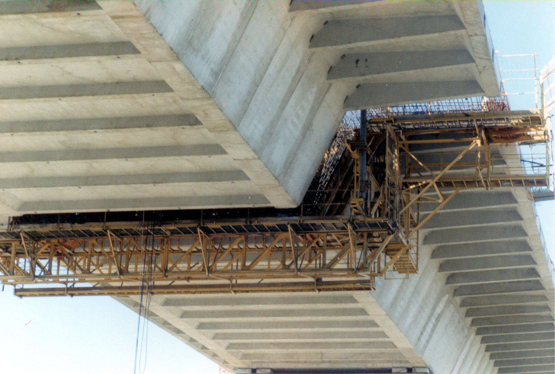 Pont de Cheviré - Equipage mobile pour le clavage d'une travée